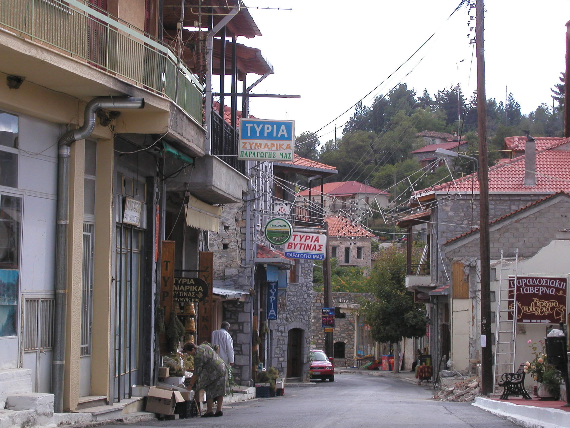 Vytina